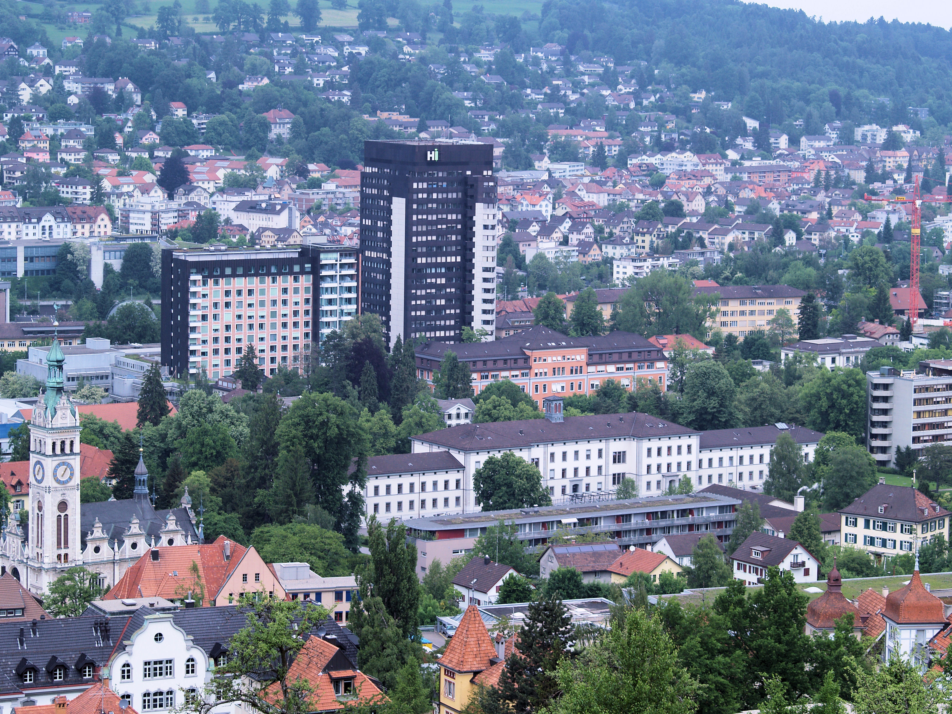 Sicht auf das Stadtgebiet von St. Gallen mit dem Kantonsspital im Mittelpunkt. Aufgenommen von Dreilindenweg.